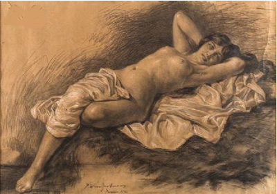 Nu recostado, carvão e pastel, 40,5x57,5 cm